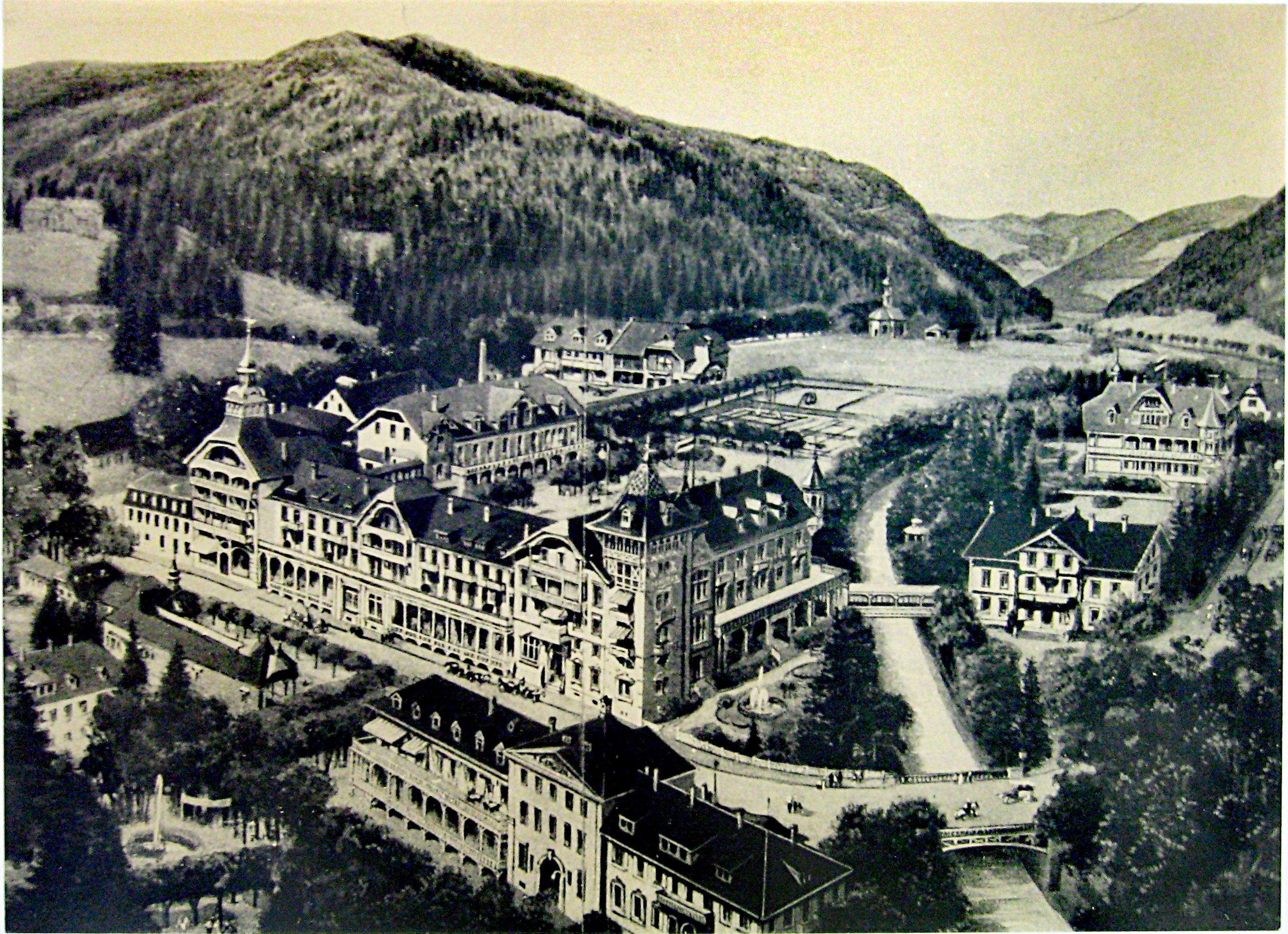 Kurhaus und Hotel um 1884 in Sankt Blasien